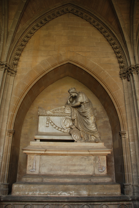 espoz y mina